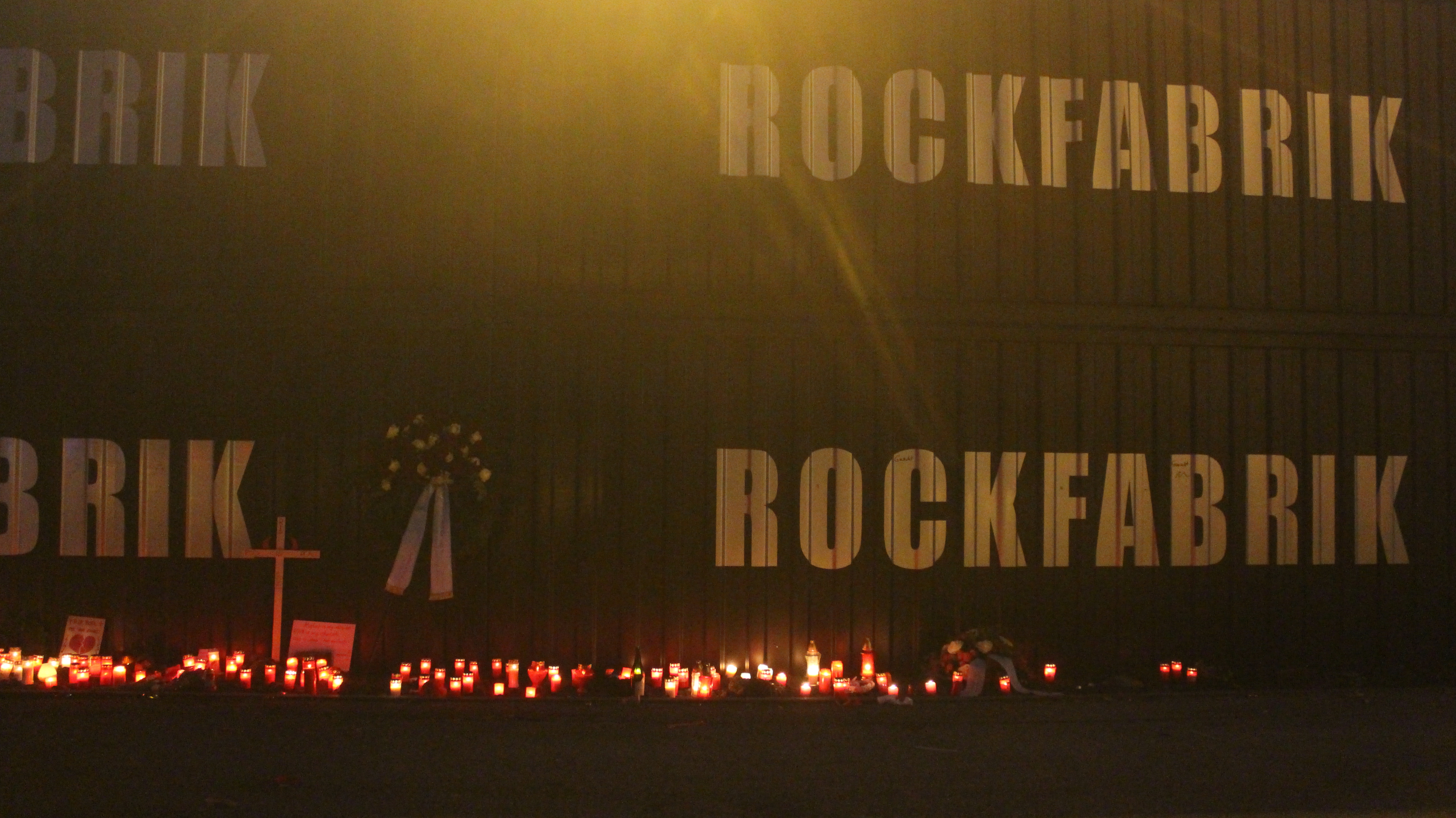 Trauerkerzen für die Schließung der Ludwigsburger Rockfabrik am 1.1,2020